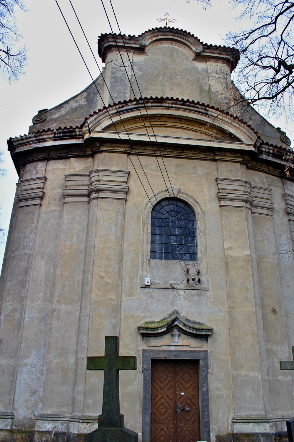 Svémyslice kostel sv. Prokopa